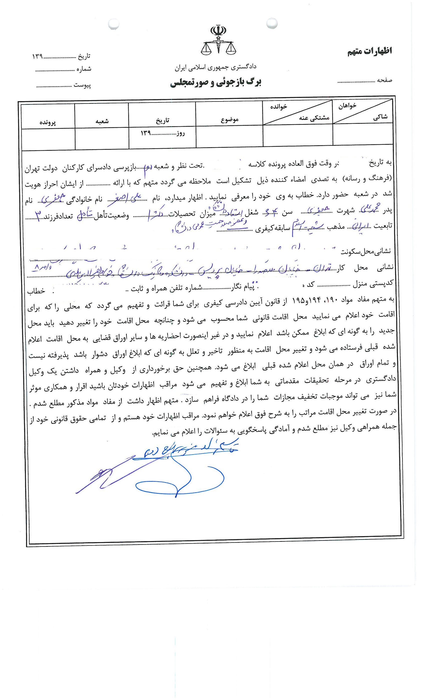 صفحه اول توضیحات دکتر علی اصغر جعفری به مقام قضایی